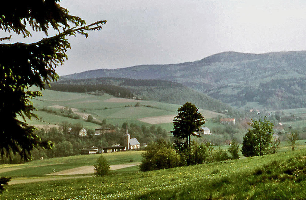 Panorama Wojciechowice w 1967